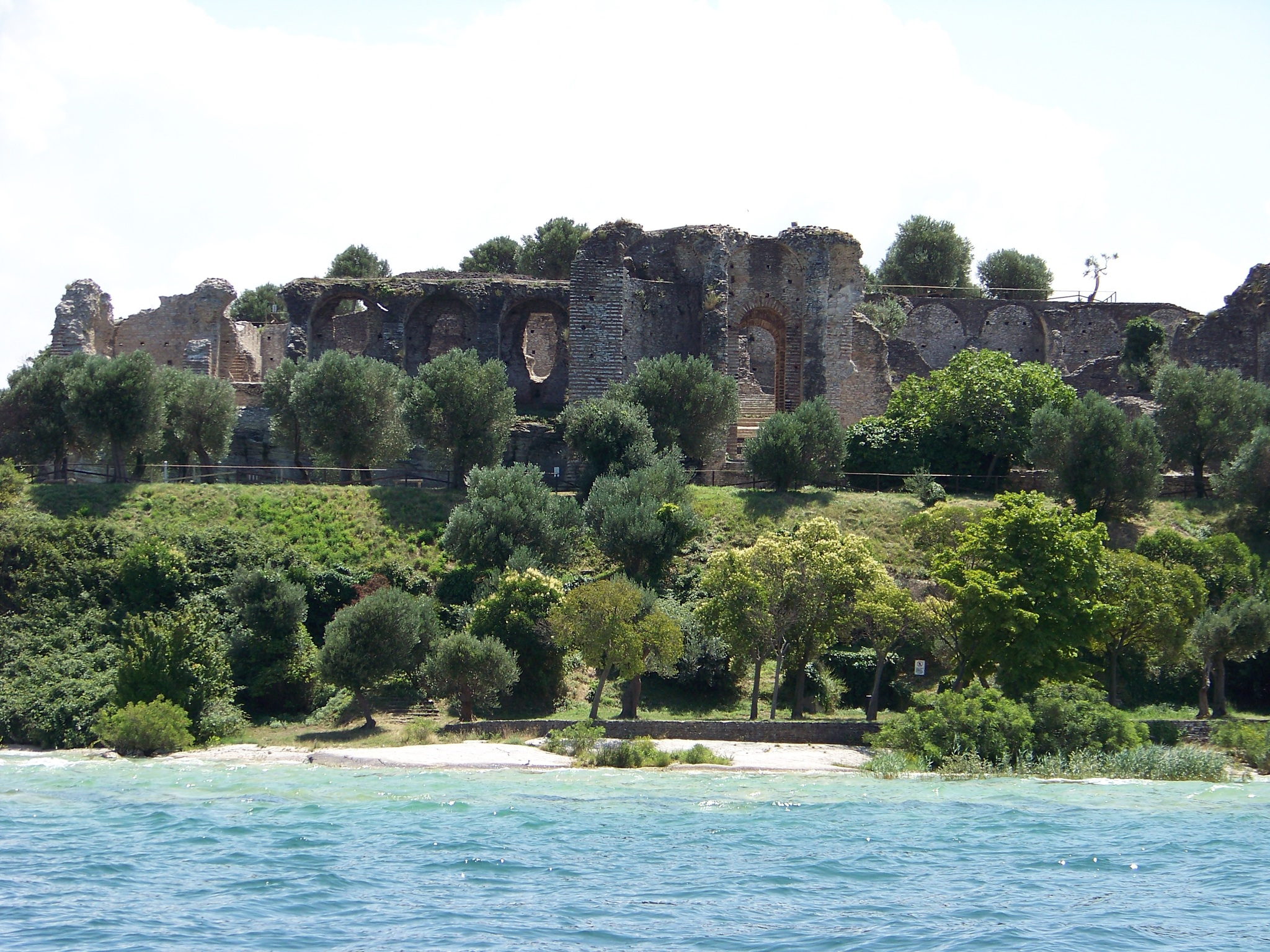 Museo Grotte di Catullo This is a photo of a monument which is part of cultural heritage of Italy.